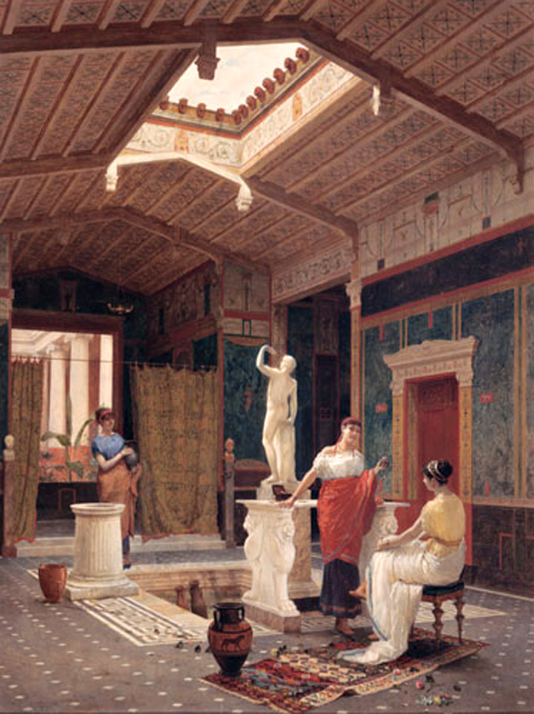 A Pompeian Interior